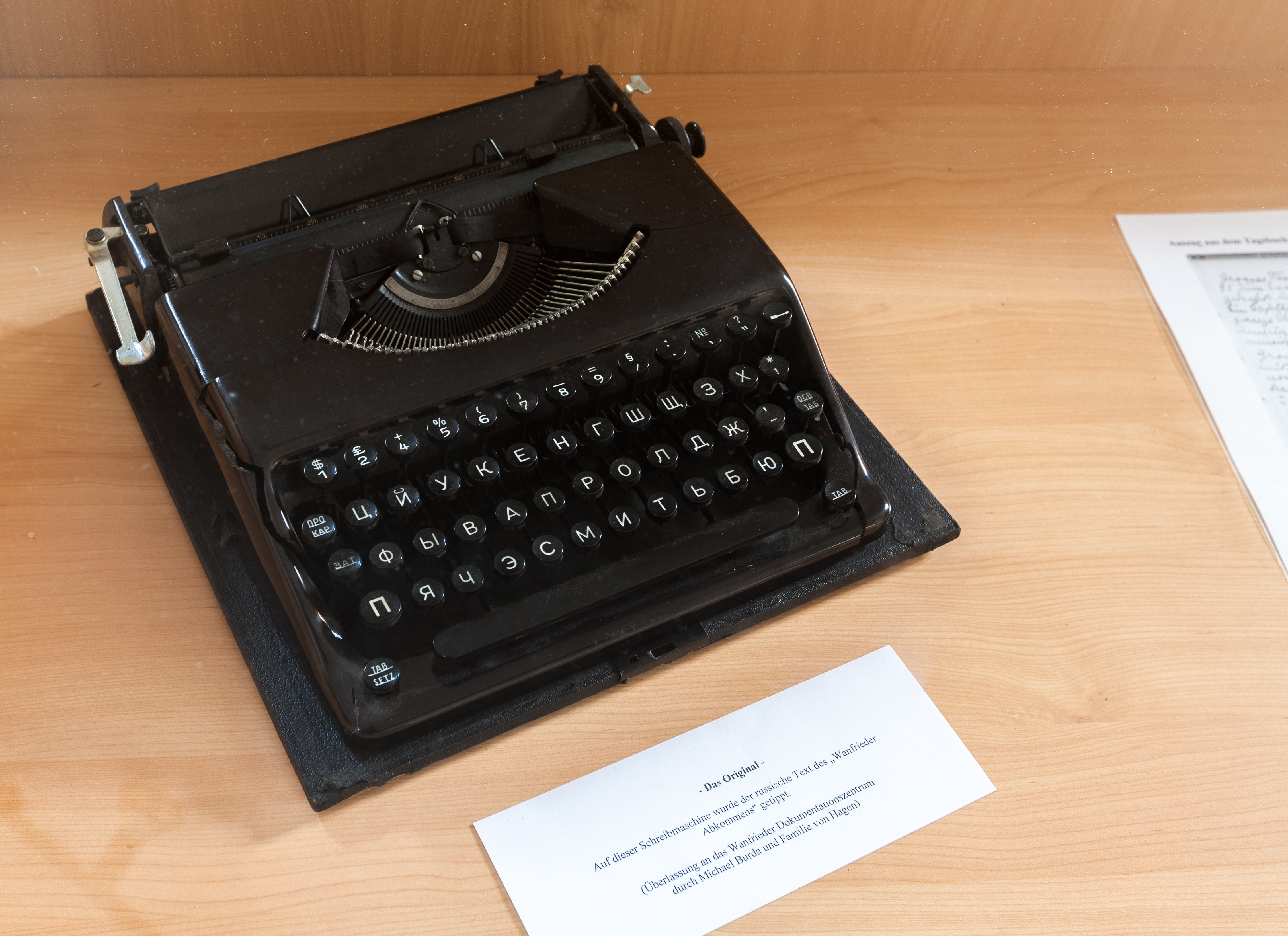 Schreibmaschine mit kyrillischer Tastatur auf der die russische Fassung des Wanfrieder Abkommens geschrieben wurde. Die Schreibmaschine ist Teil der Sammlung des Heimatmuseum und Dokumentationszentrum zur deutschen Nachkriegsgeschichte in Wanfried, Hessen, Deutschland und wurde dem Museum durch Michael Burda und Familie von Hagen überlassen.